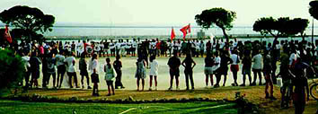 Ecosy Summer Camp in Mazagon 1997